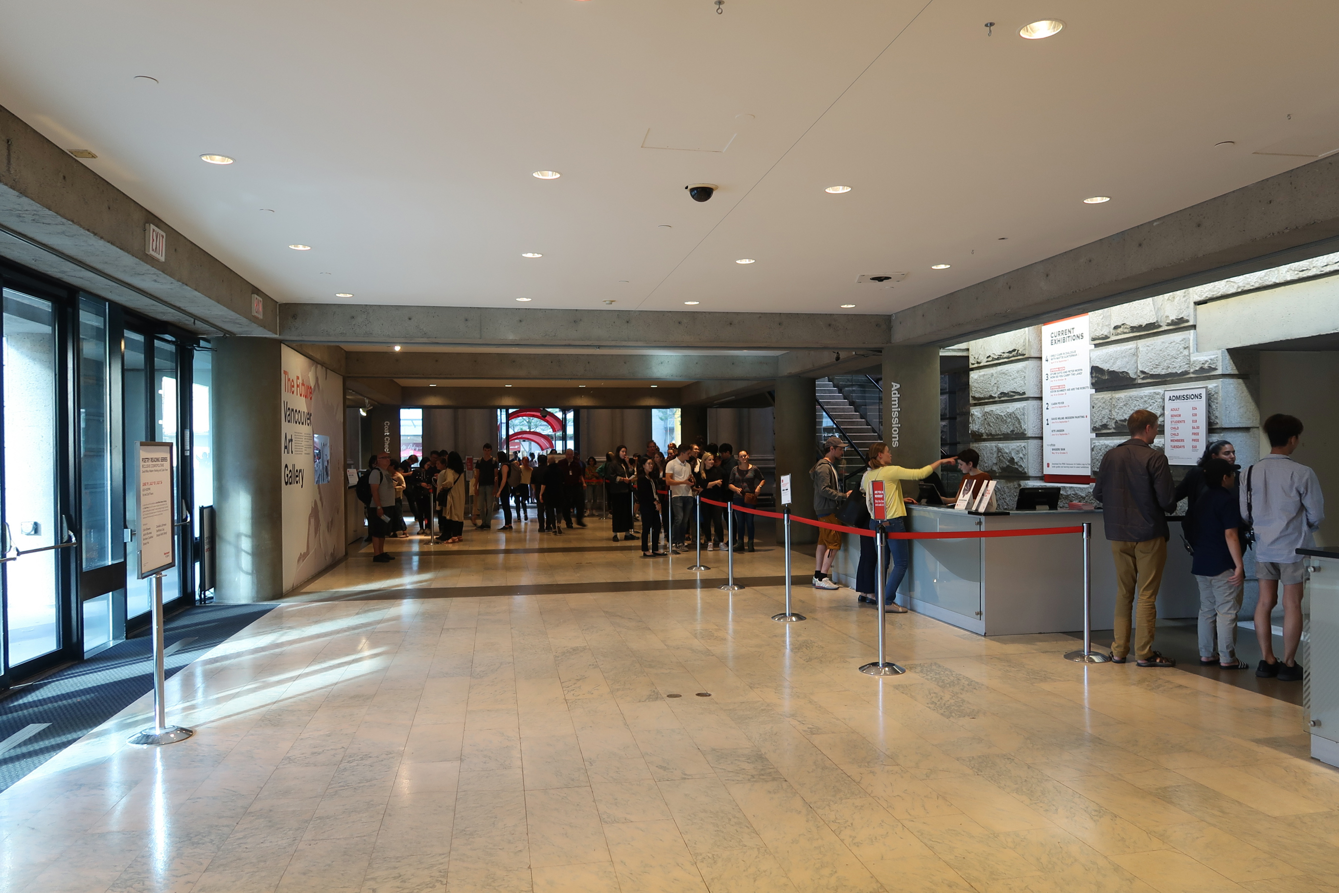 Vancouver Art Gallery Lobby